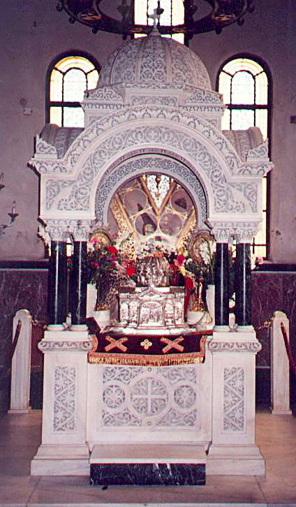 Relikwi Andreas, Patras